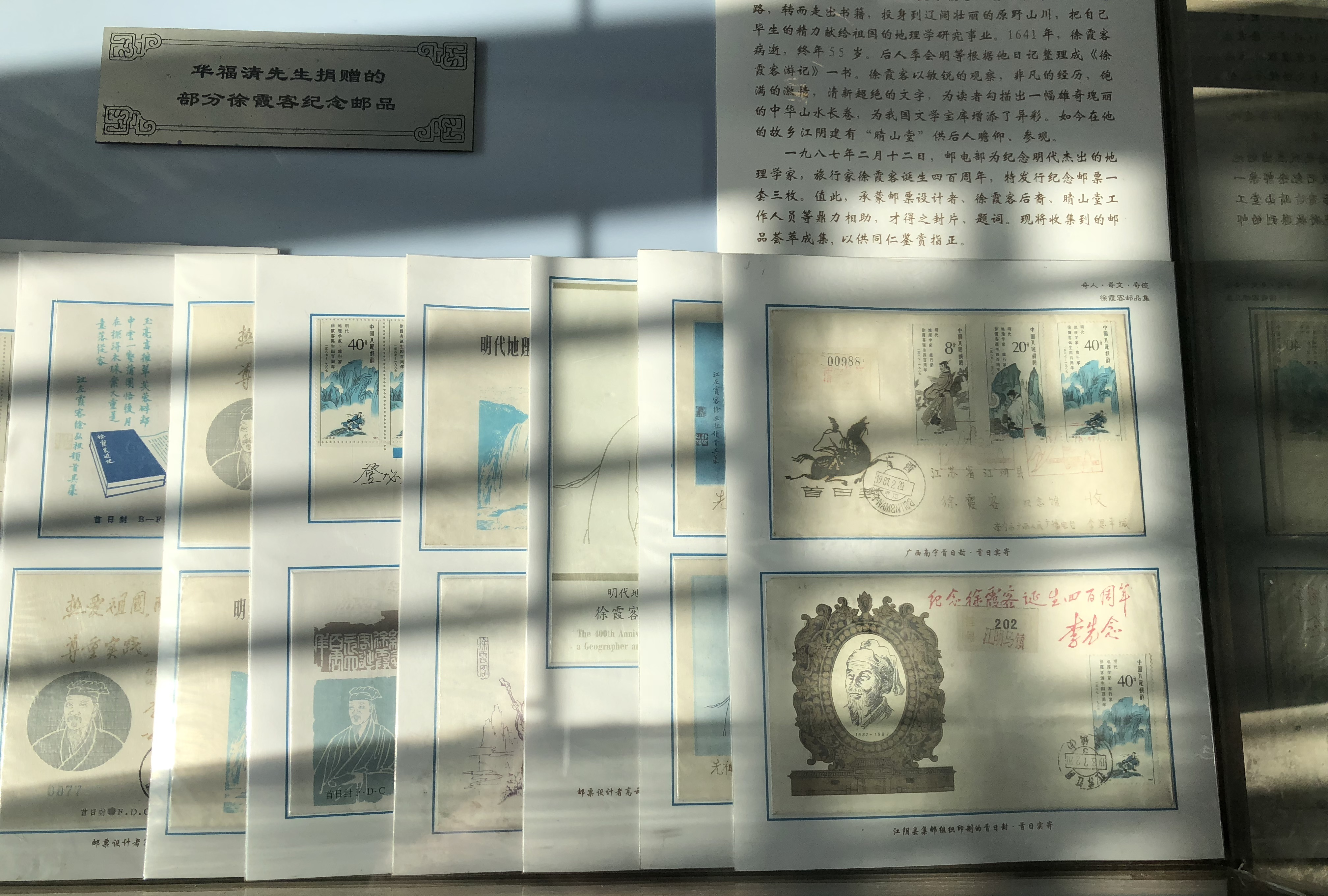 中文（中国大陆）: 徐霞客纪念邮品